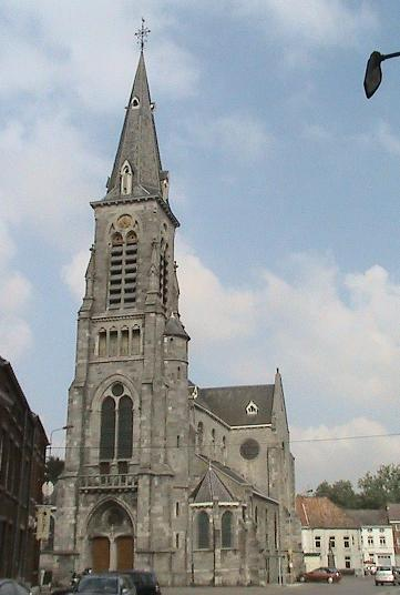 Église Saint Martin à Ham-sur-Heure (porche d'entrée)